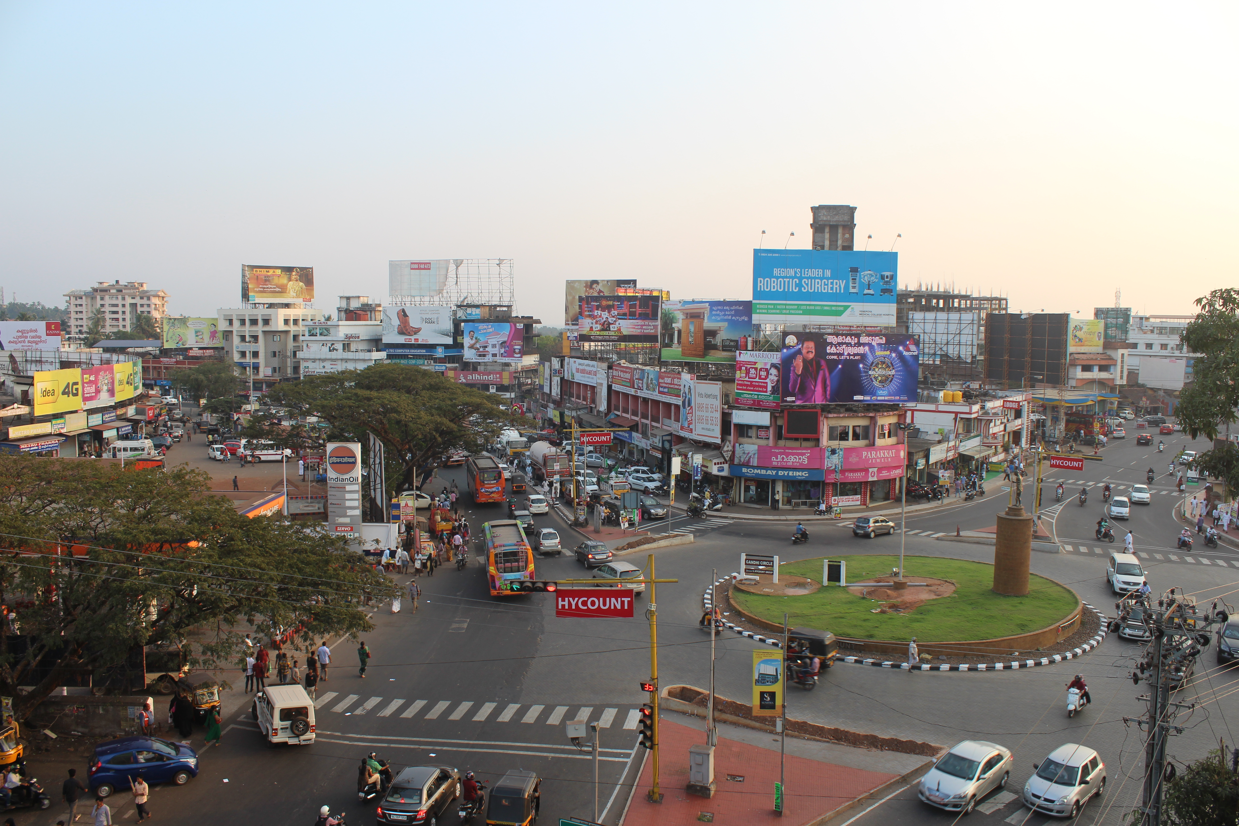 ഗാന്ധി സെർക്കിൾ കാൽടെക്സ്